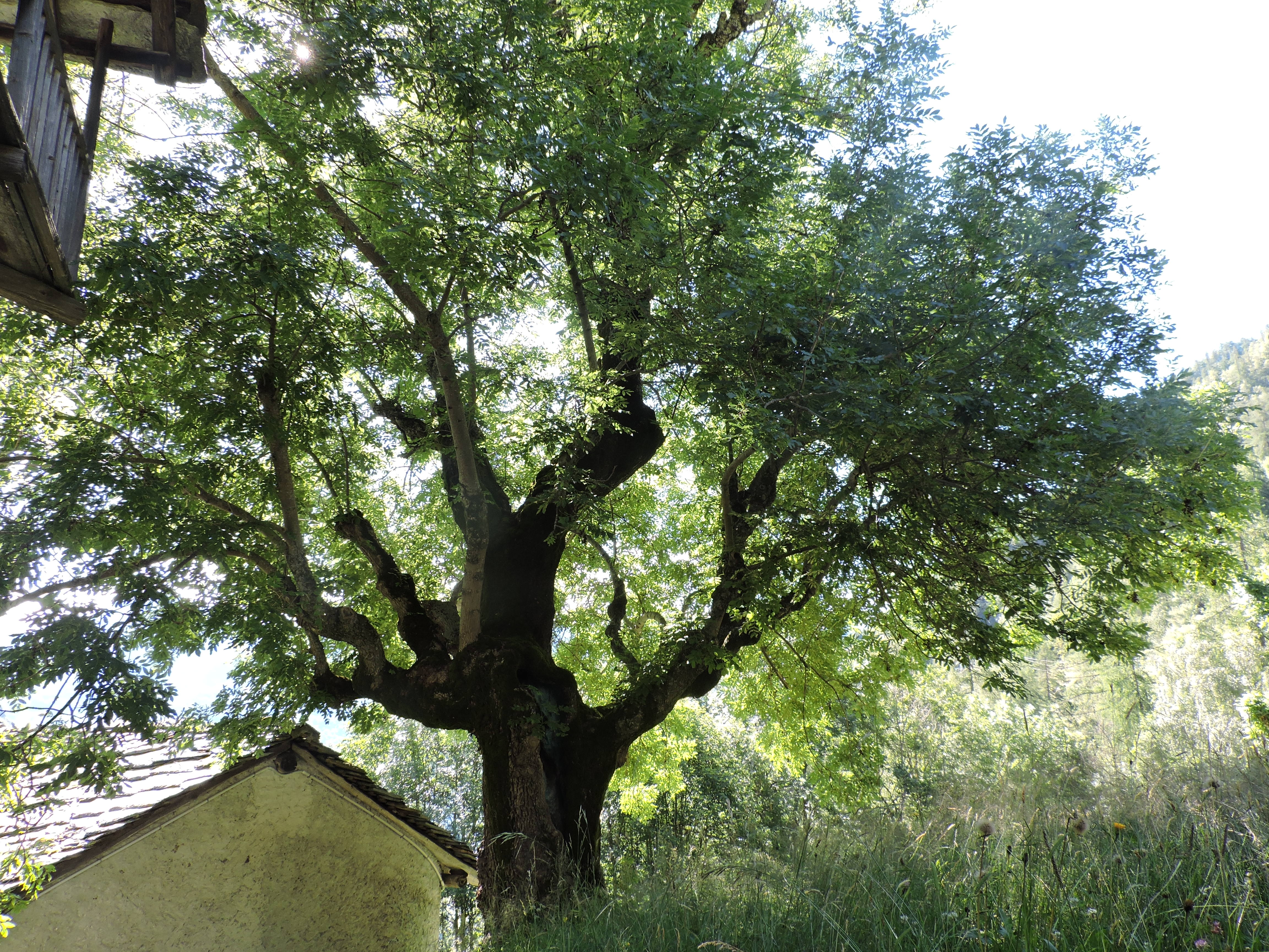 frassino maggiore This is a photo of a monument which is part of cultural heritage of Italy.